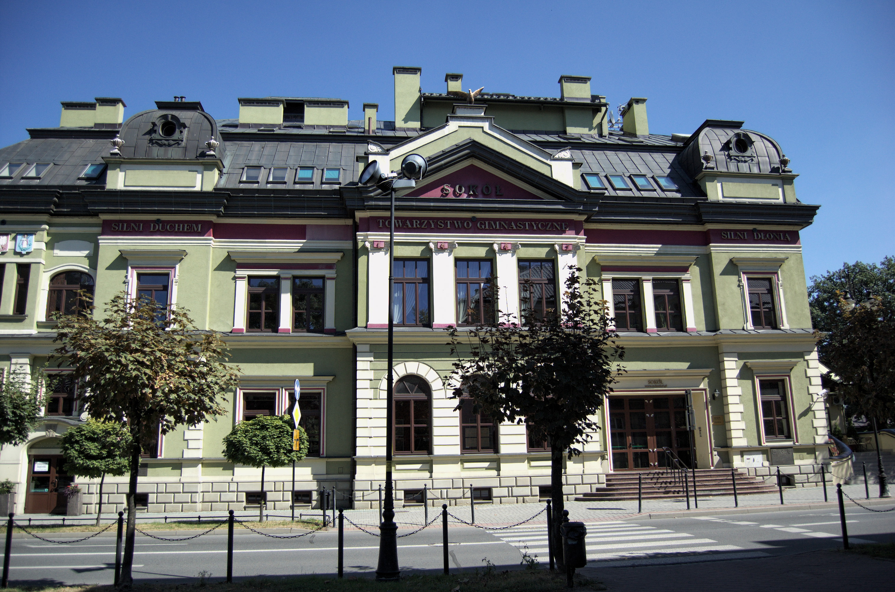 Nowy Sącz, budynek towarzystwa "Sokół", ob. kino, 1892, XX